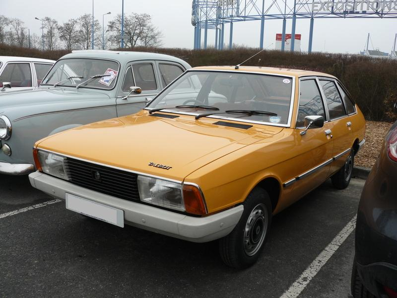 Reims 2012